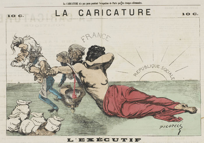 L'Exécutif (il governo Thiers-Favre) dissangua la Francia, disegno in La Caricature politique, 11 marzo 1871